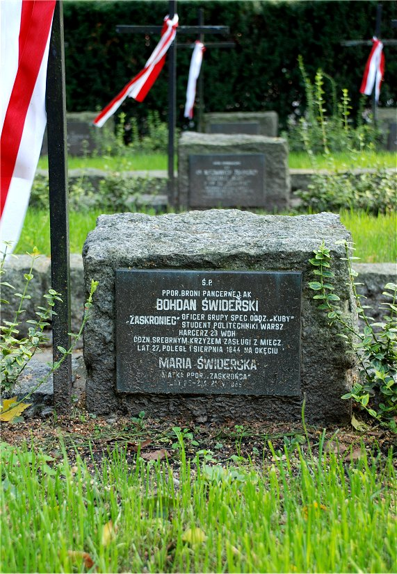 Grób na Powązkach Wojskowych w Warszawie